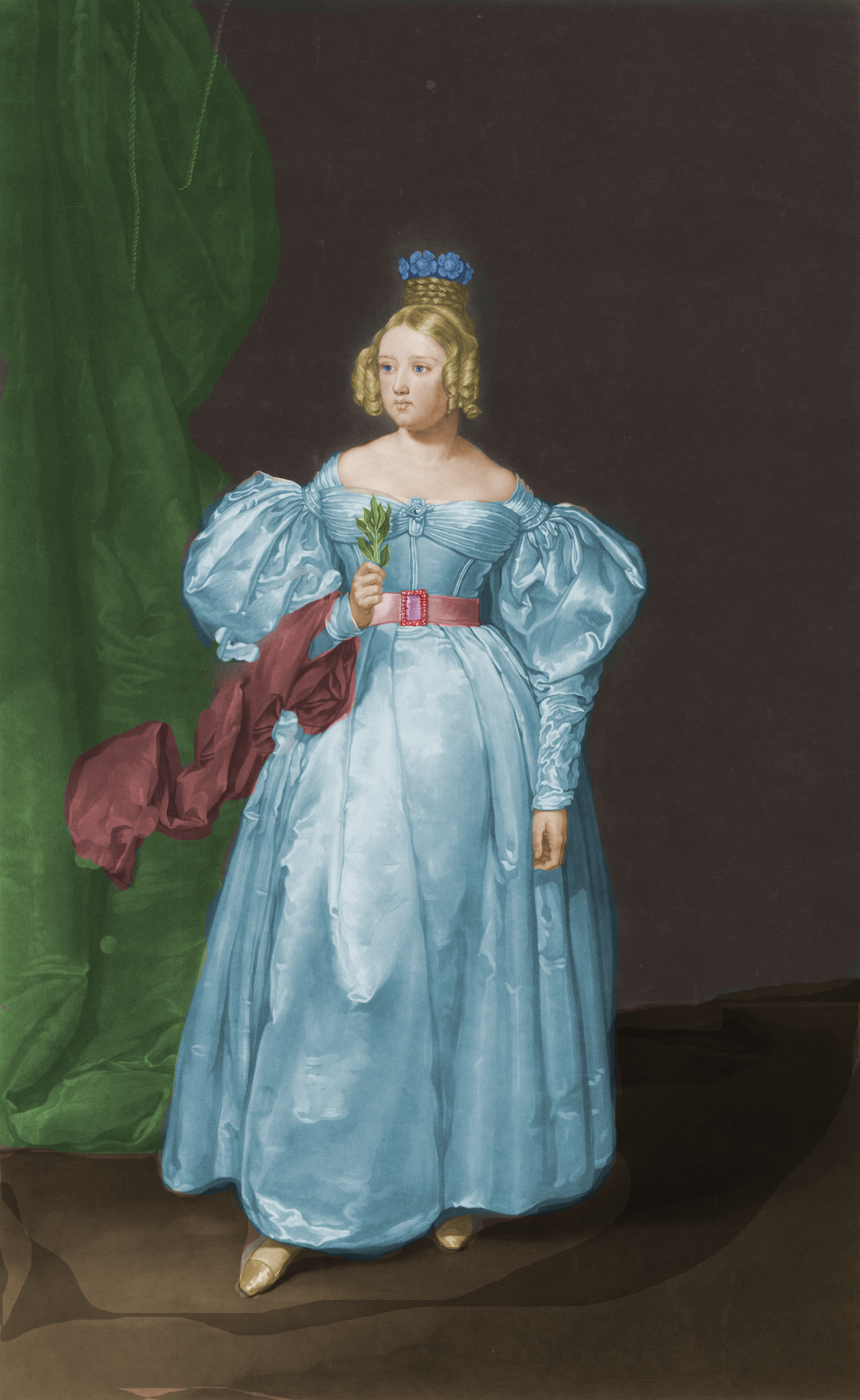 Litografia digitalmente colorida.